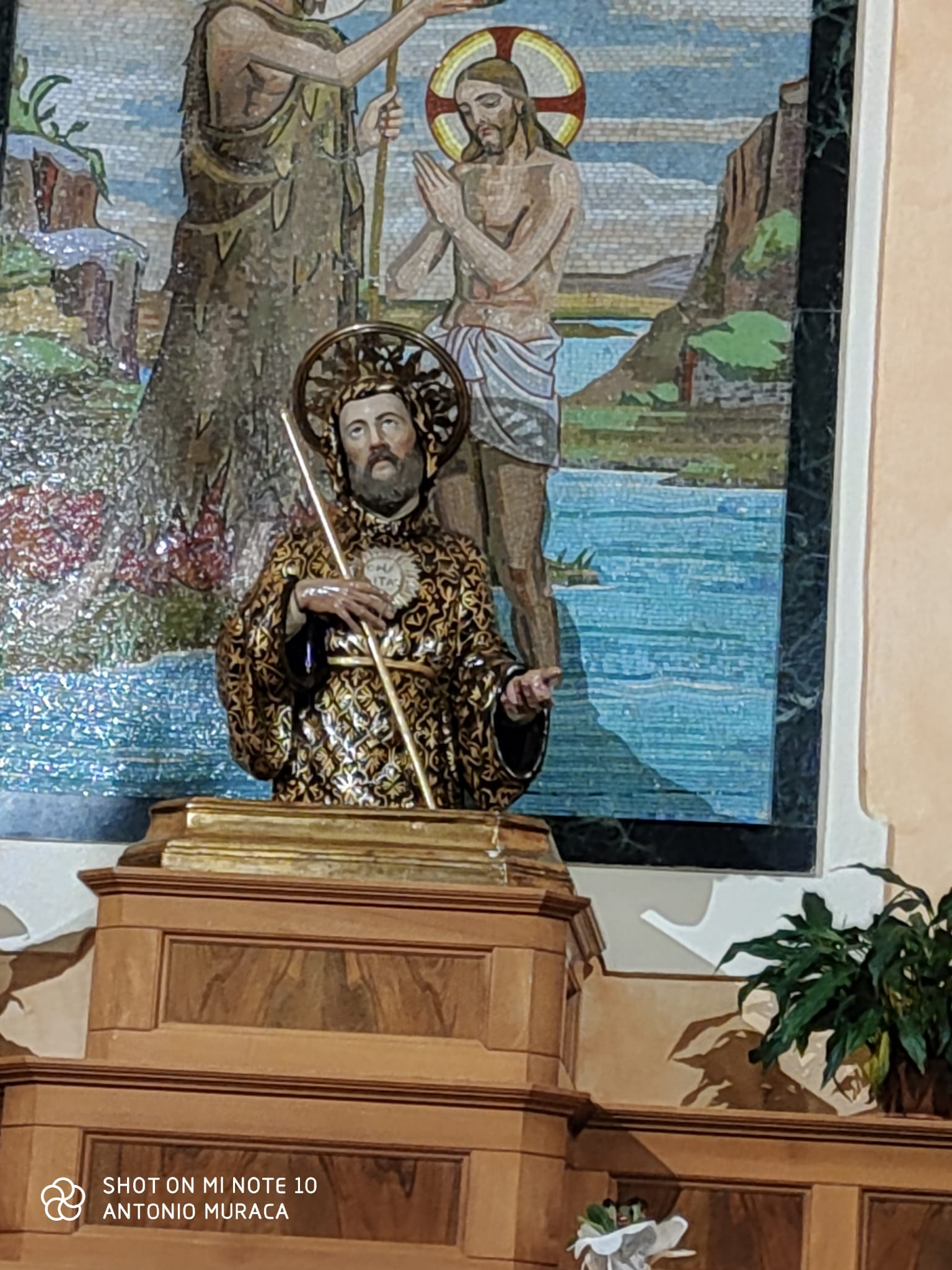 Busto ligneo di San Francesco di Paola in Sambiase